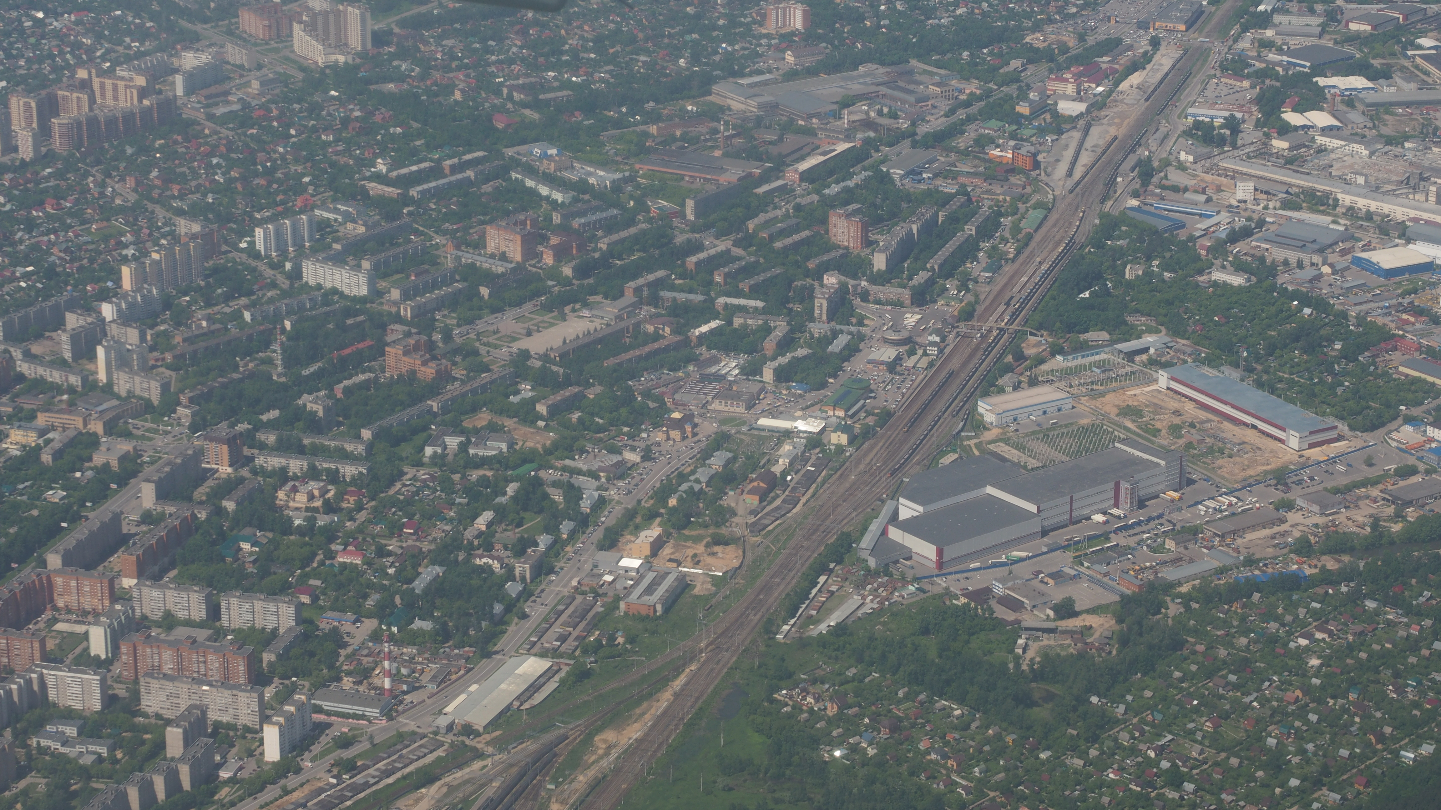 Taken from plane Domodedovo - Astrakhan